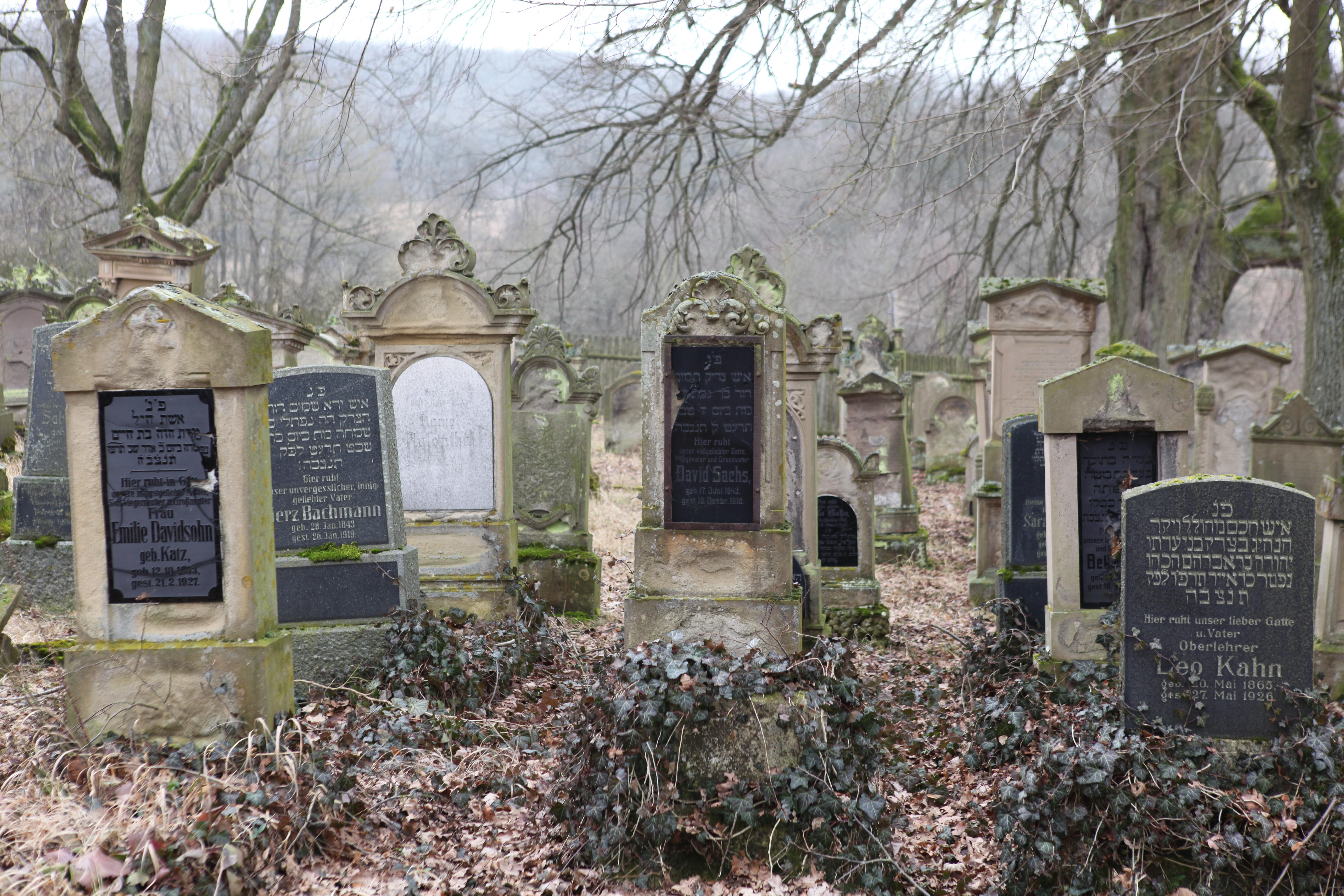 Jüdischer Friedhof Gleicherwiesen, OT von Gleichamberg, Landkreis Hildburghausen